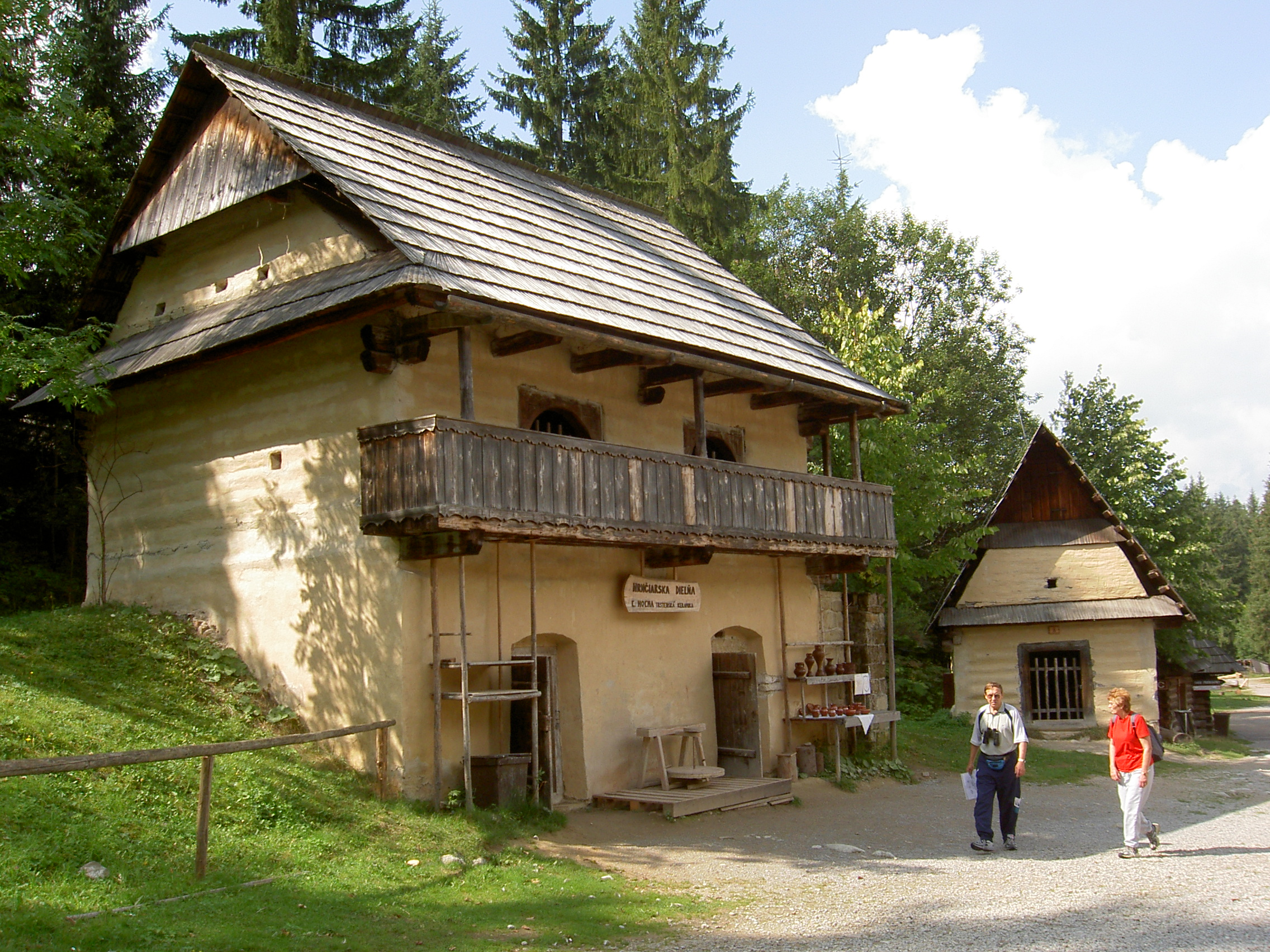 Múzeum oravskej dediny Zuberec - Brestová